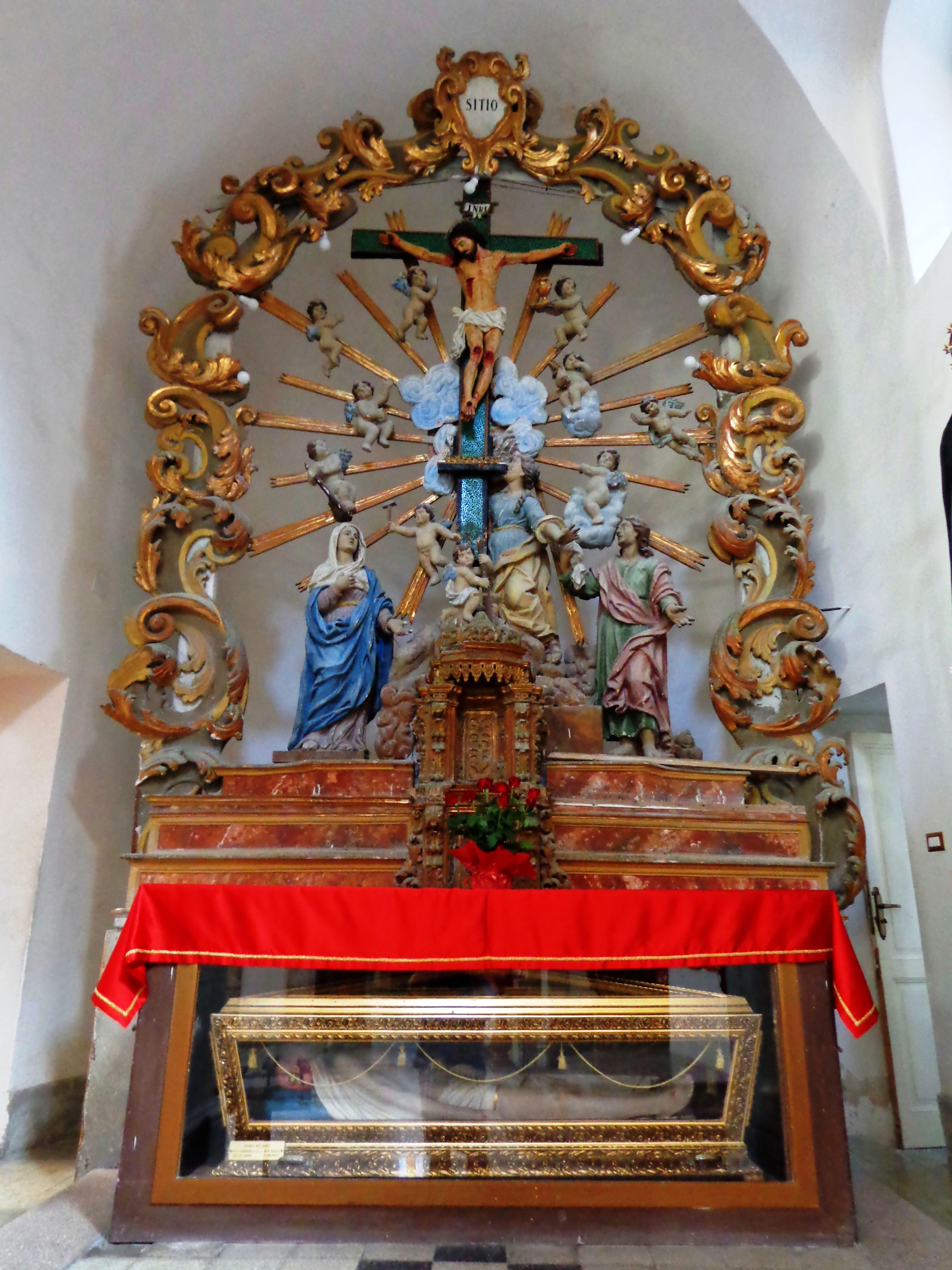 Duomo Condrò transetto dx